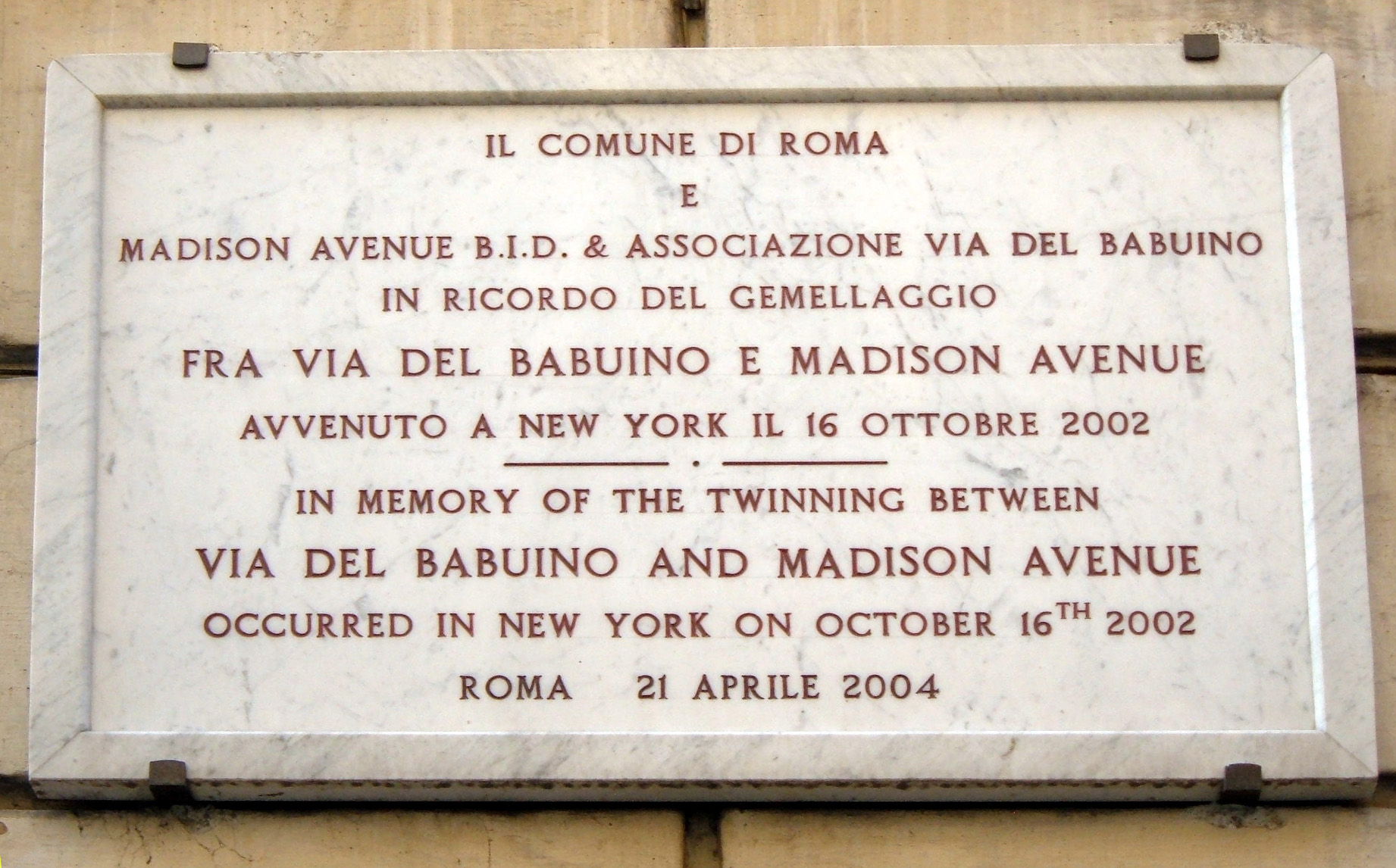 Roma, via del Babuino 164, lapide a ricordo del gemellaggio tra Via del Babuino e Madison Avenue a New York.